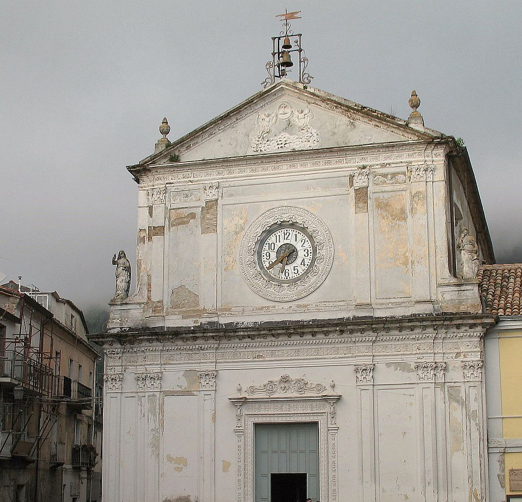 Tiriolo Chiesa